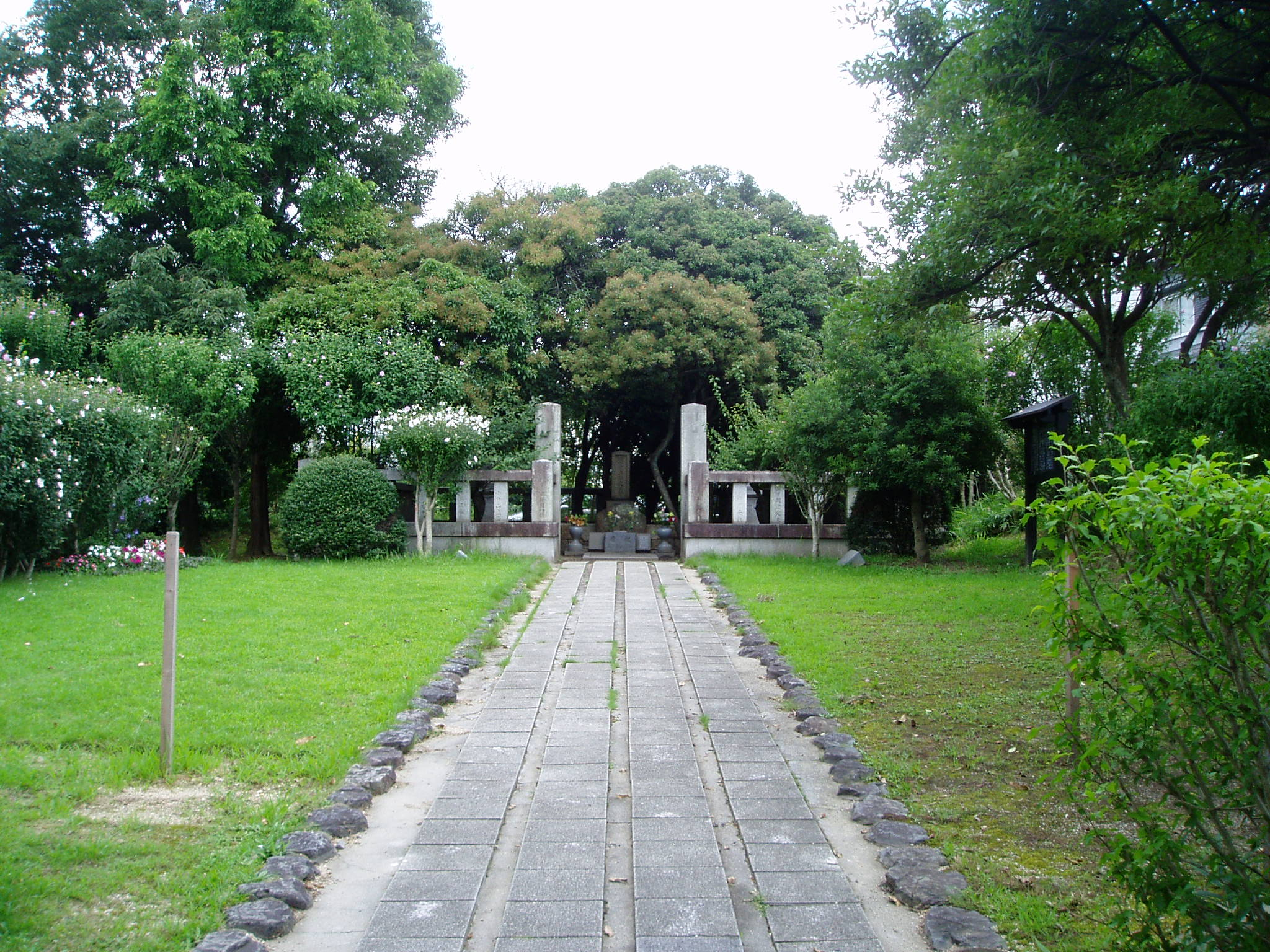 伝 王仁墓(大阪府枚方市) Grave of Wani, Hirakata, Osaka, Japan 2006年7月30撮影 撮影機材:OLYMPUS μ10 撮影者:Maechan0360